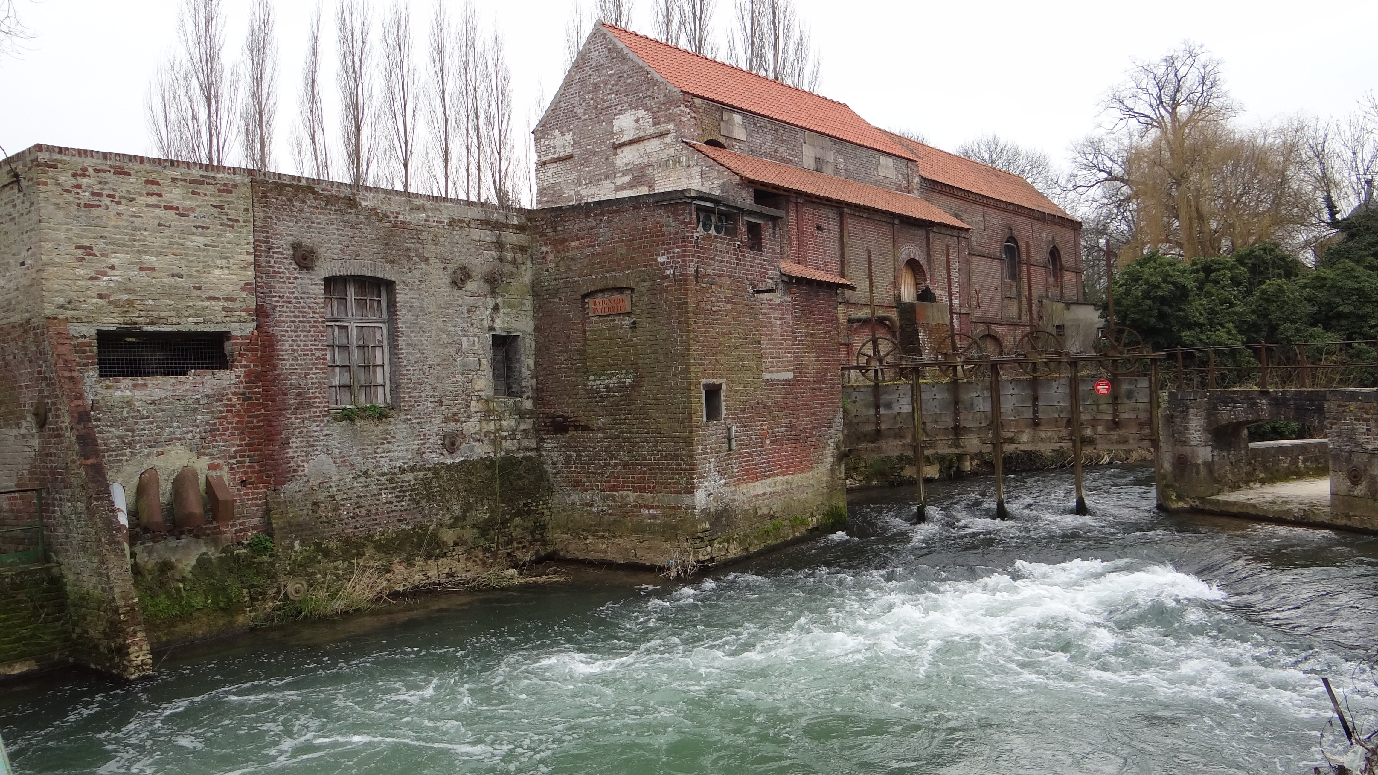 Blendecques AA